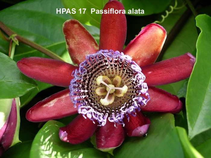 Van de Amerikaanse overheid